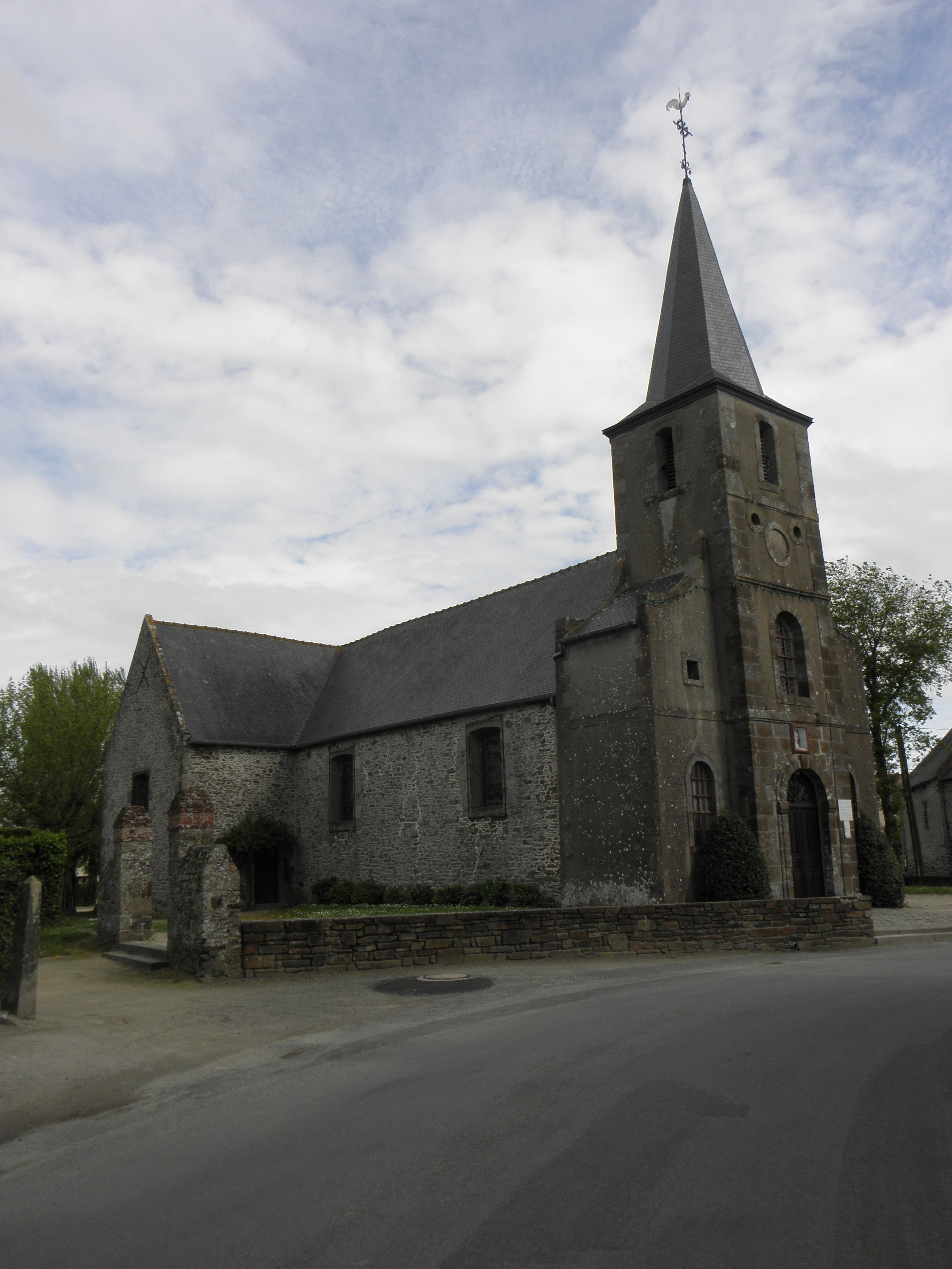 Église paroissiale de Saint-Benoît-des-Ondes (35).